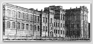 Запорізький_національний_технічний_університет_old, Головний корпус університету (1924р.) Zaporozhia national technical university